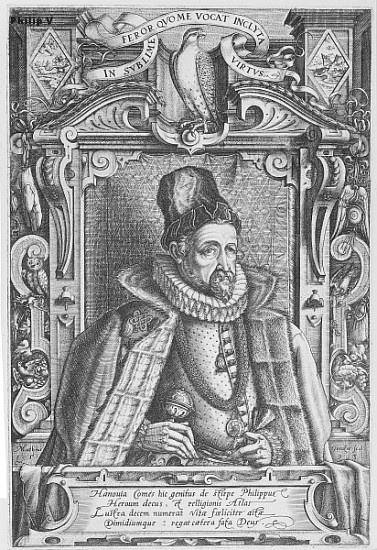 Portrait de Philippe V de Hanau-Lichtenberg